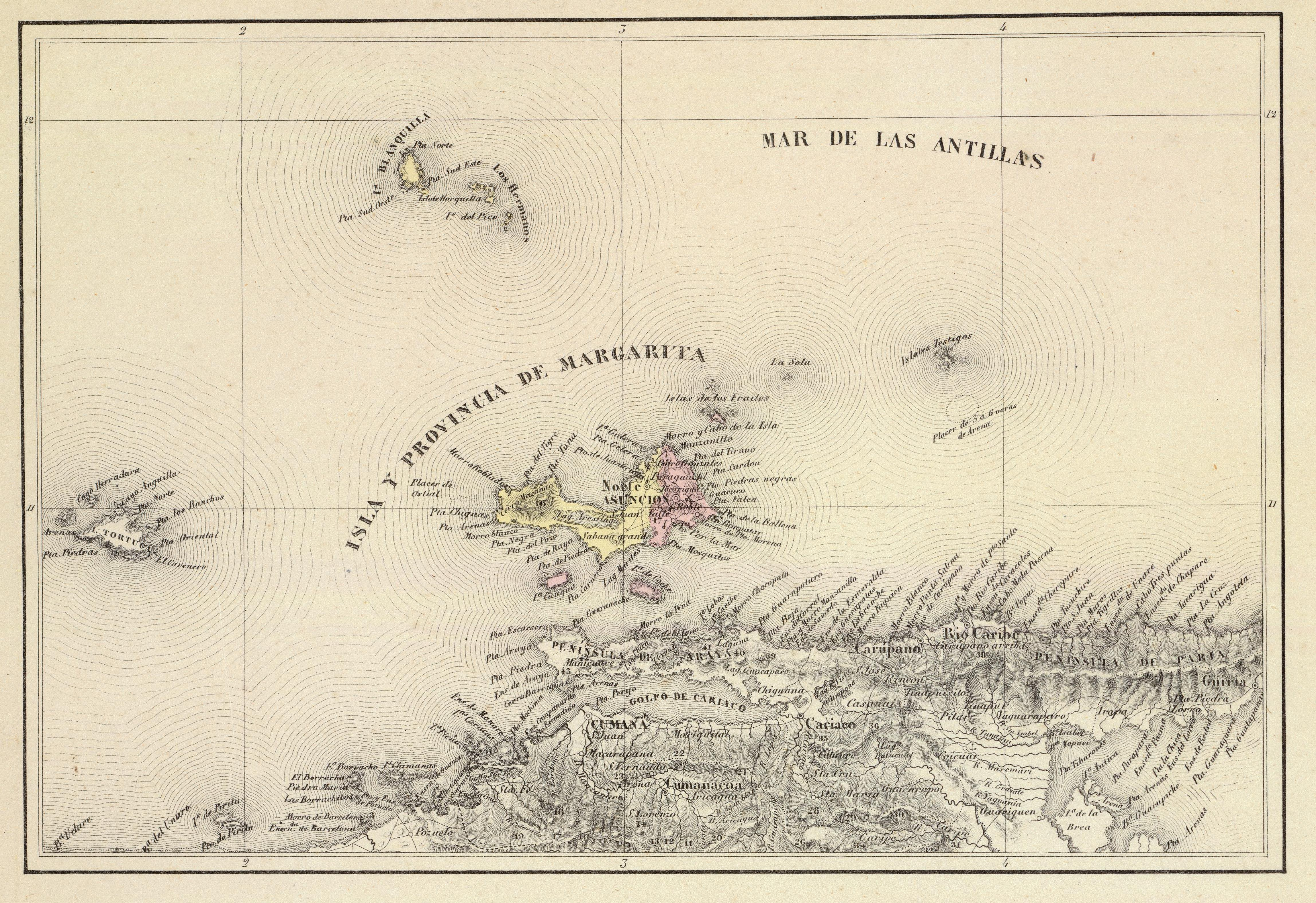 Provincia de Margarita. Tomado del "Atlas físico y político de la República de Venezuela", 1840.